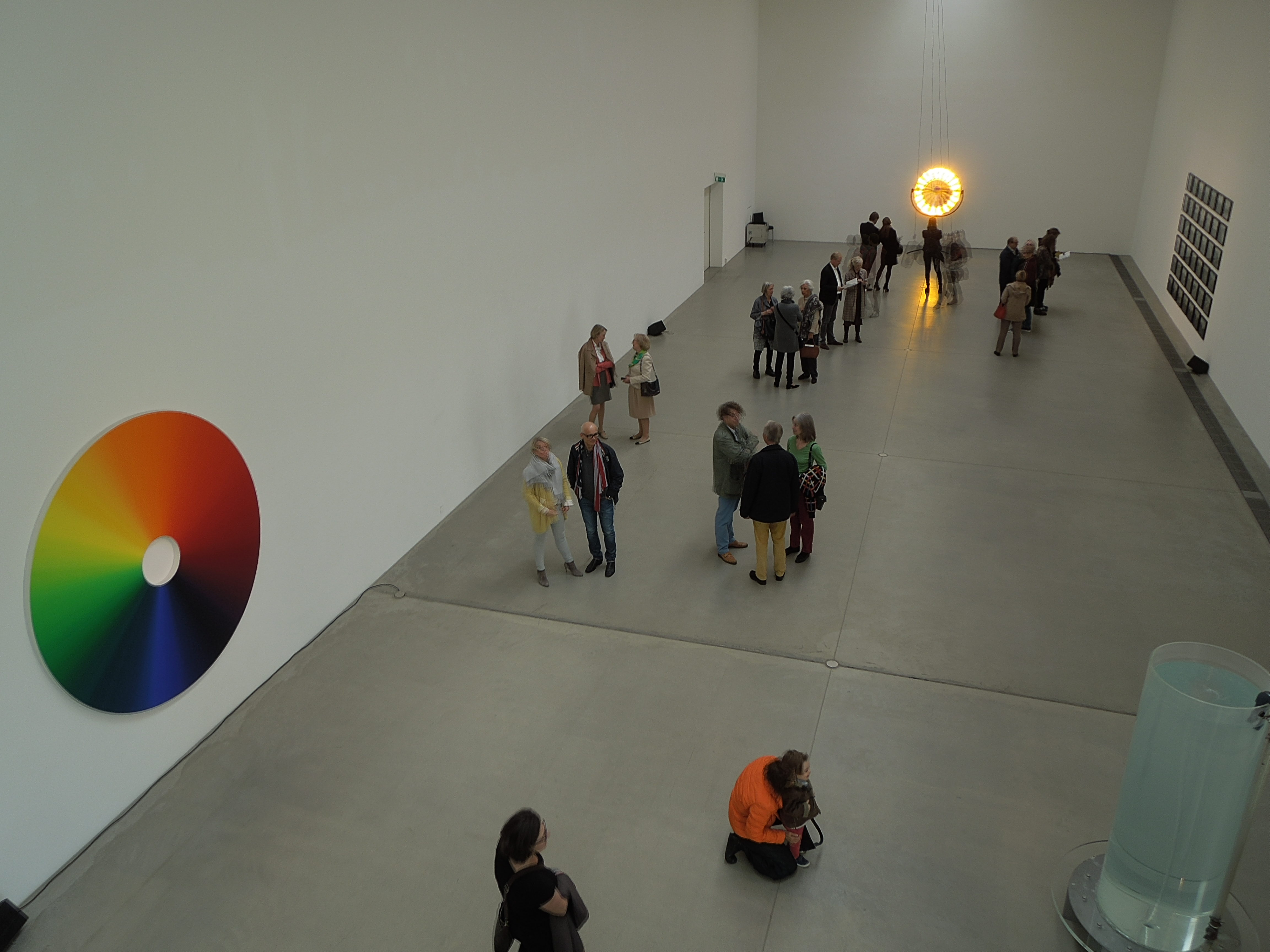 Die Langen Foundation zeigt vom 18. April bis 18. Oktober 2015 Werke aus der Sammlung Boros des Künstlers Olafur Eliasson.